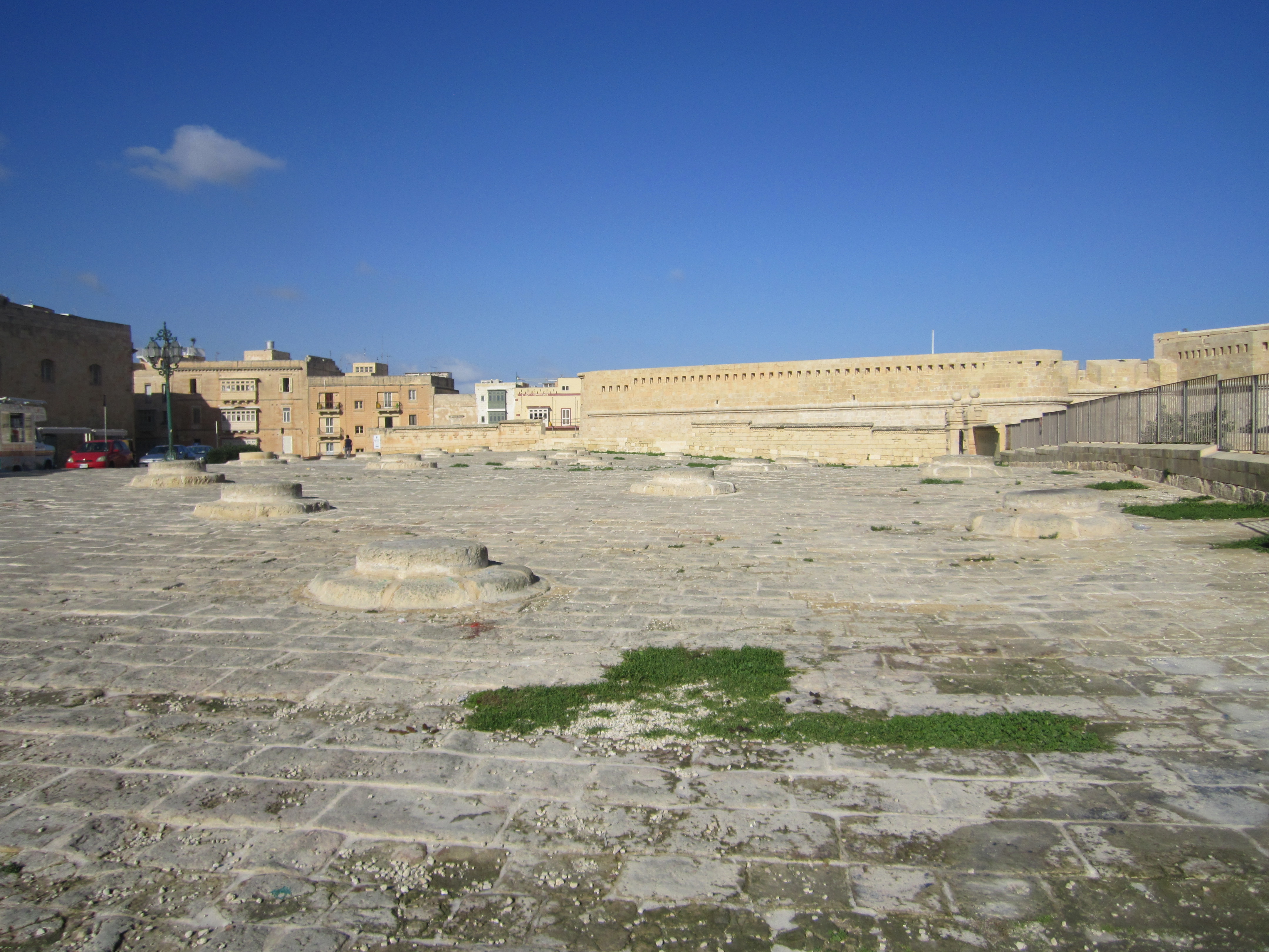 Vista de la entrada al fuerte desde la ciudad